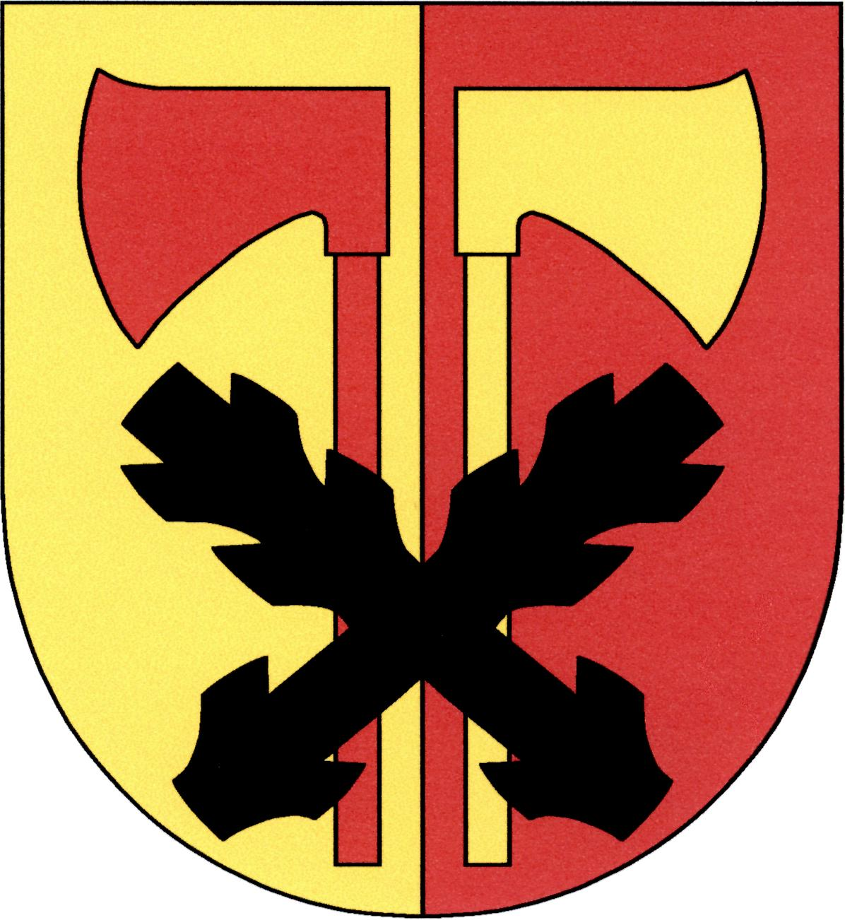 Znak obce Janov v okrese Děčín